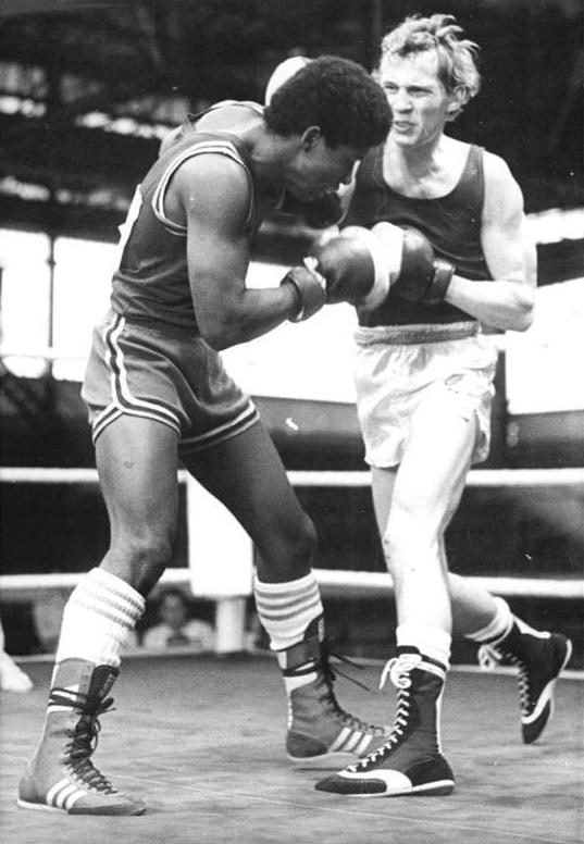 Jose Guzman, Andreas Otto ADN-ZB Lehmann 8.3.83 Halle: XII. Internationales Boxturnier um den Chemiepokal - Seinen ersten Kampf gewann DDR-Leichtgewichlter Andreas Otto (r.) einstimmig nach Punkten gegen Jose Guzman aus Venezuela. Mit 102 Aktiven aus 12 Ländern hat das Turnier seine bisher größte Beteiligung gefunden.